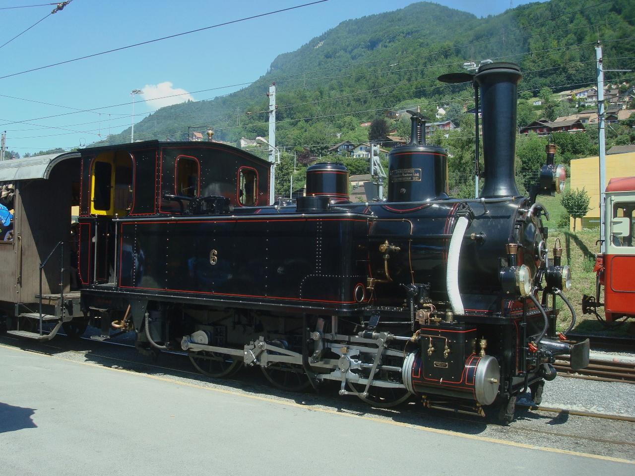 Dampflokomotive G 3/3 6 der Bière–Apples–Morges-Bahn (BAM) bei der Museumsbahn Blonay-Chamby (BC) im Sommer 2010 in Blonay. Ursprünglich Jura–Bern–Luzern-Bahn G 3/3 309, dann Jura–Simplon-Bahn (JS) G 3/3 909, dann SBB Brünig G 3/3 6.